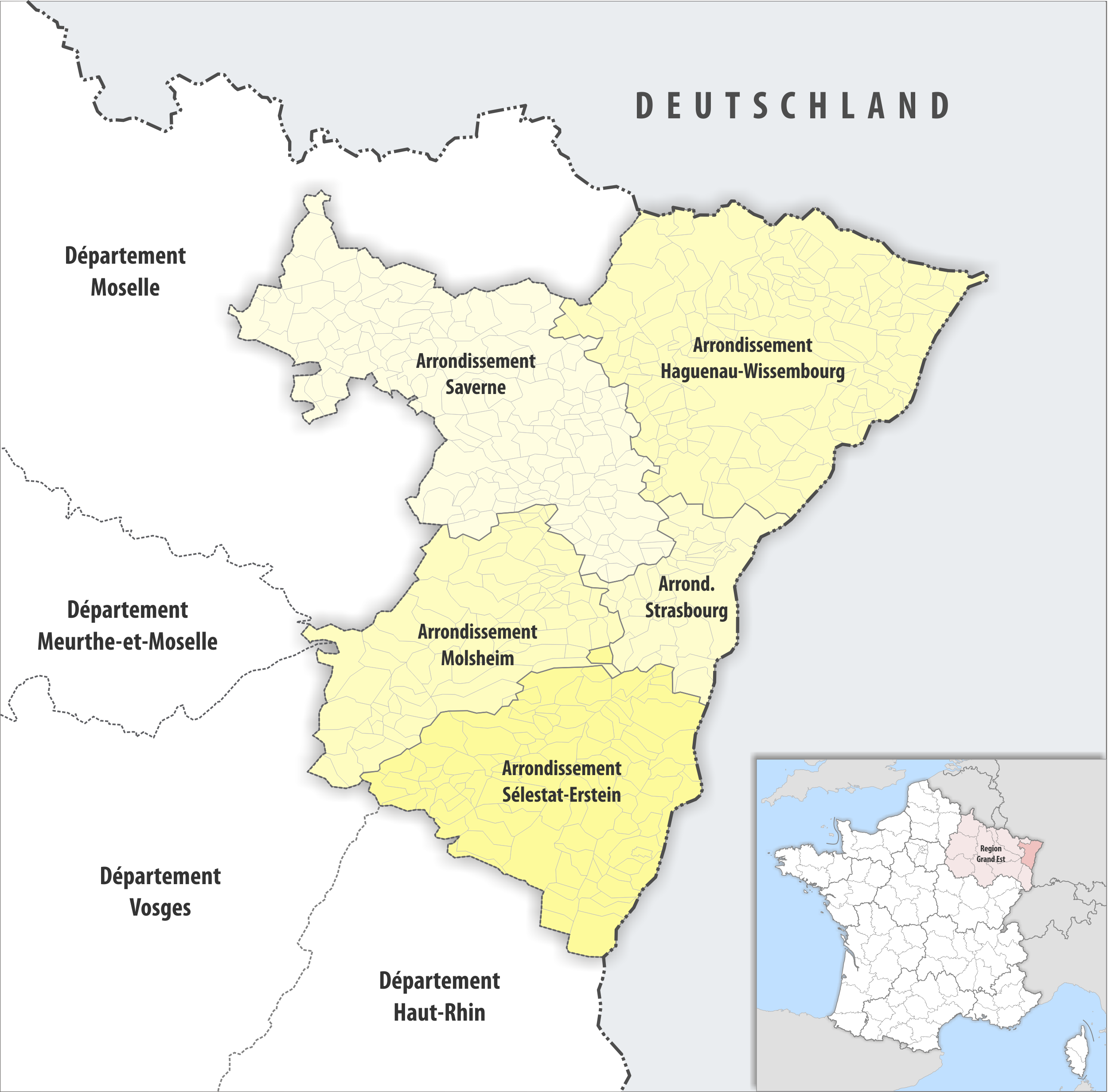 Gemeinden und Arrondissemente im Departement Bas-Rhin